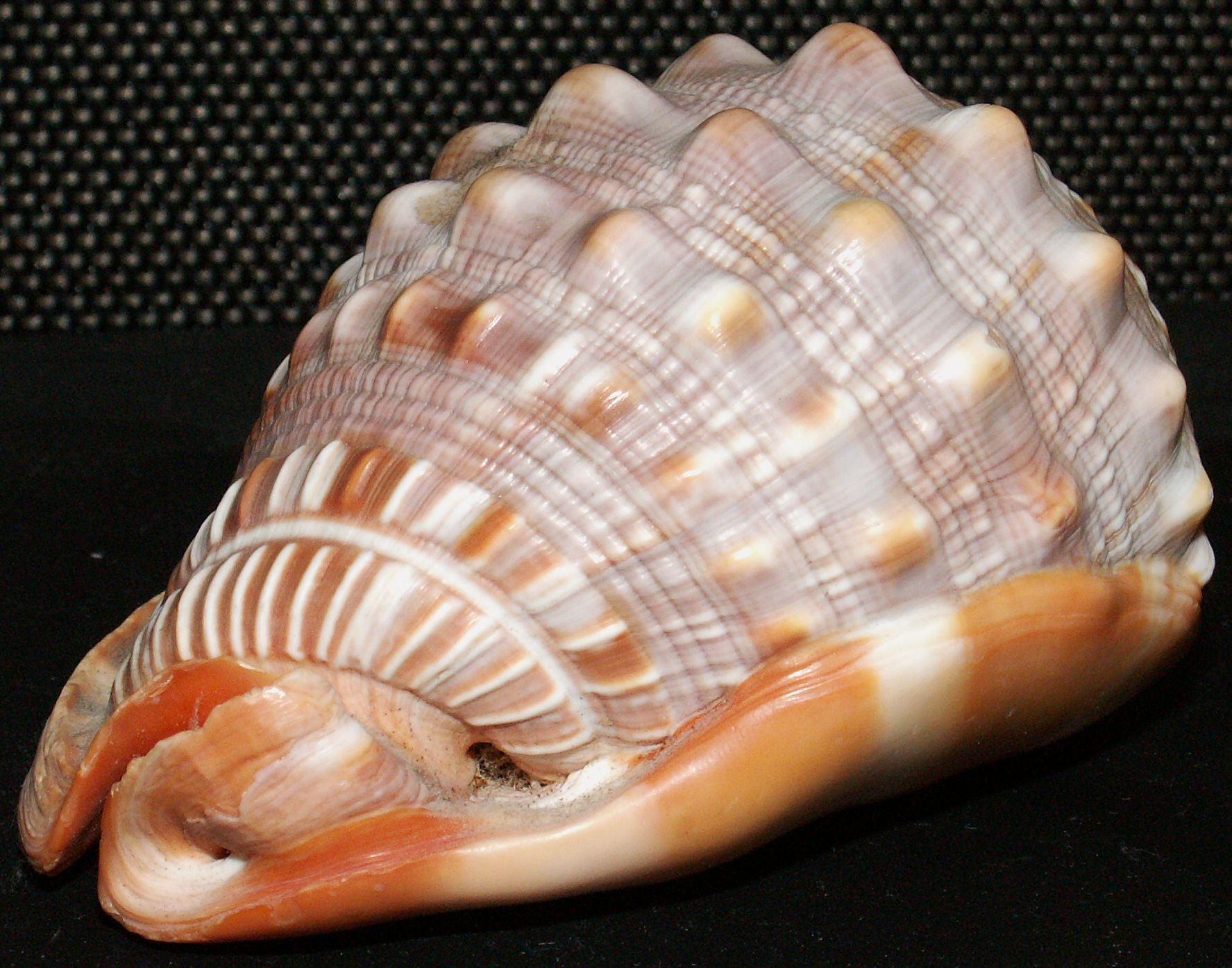 Oberseite des Hauses einer Meeresschnecke der Art Cypraecassis rufa, Urlaubssouvenier, zur Verwendung in Portal Diskussion:Lebewesen